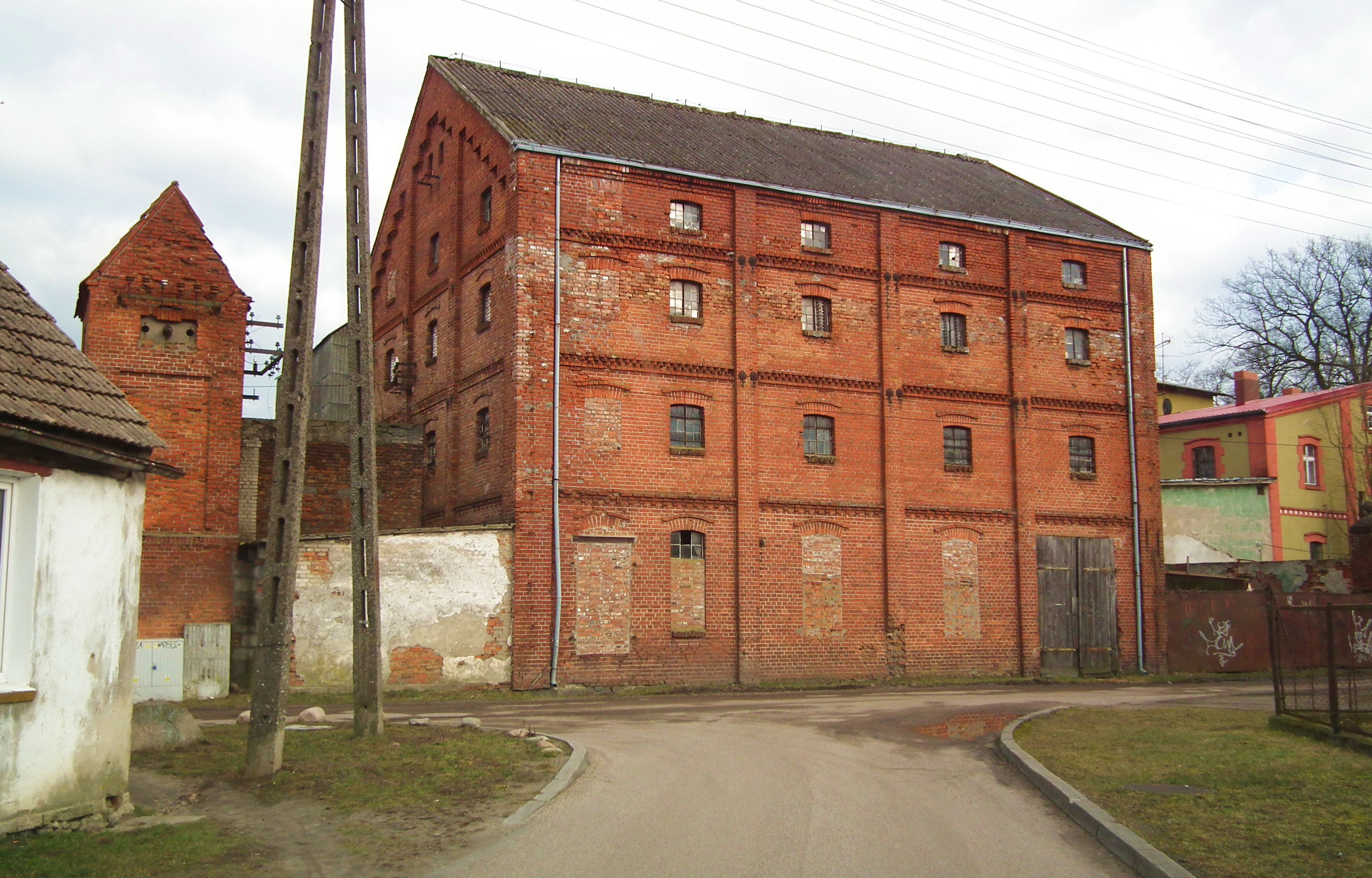 Lotyń. Zabudowania centrum wsi. Spichlerz.